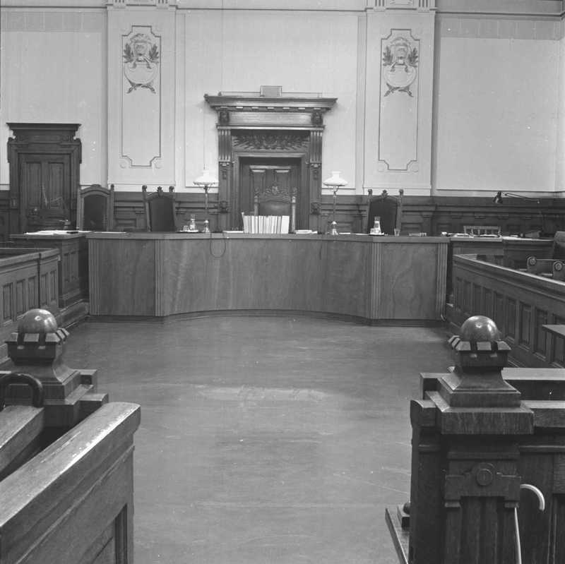 Møtesalen i Eidsivating Lagmannsrett 1965. I dag brukes denne salen for Høyesteretts andre avdeling